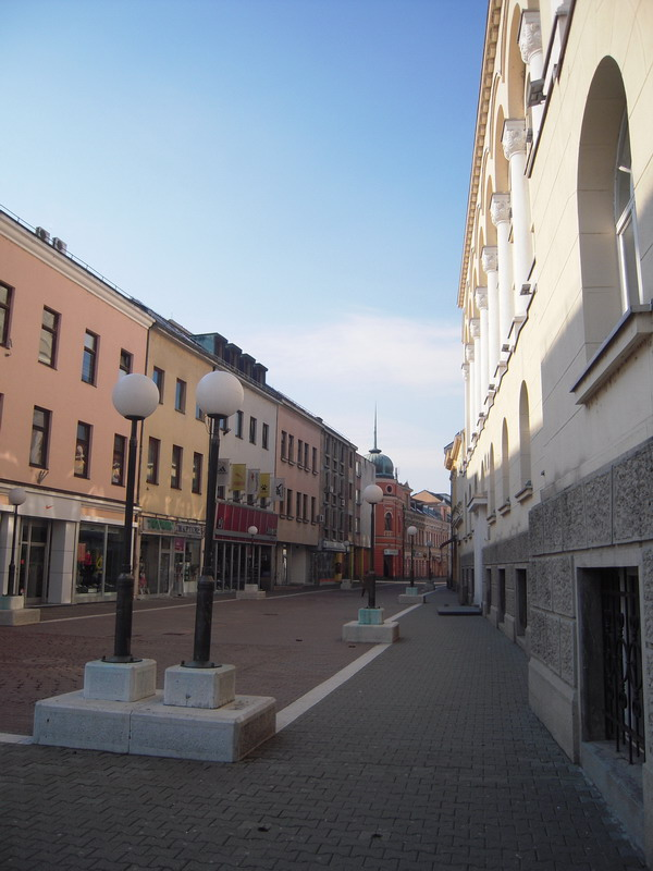 Господска_улица